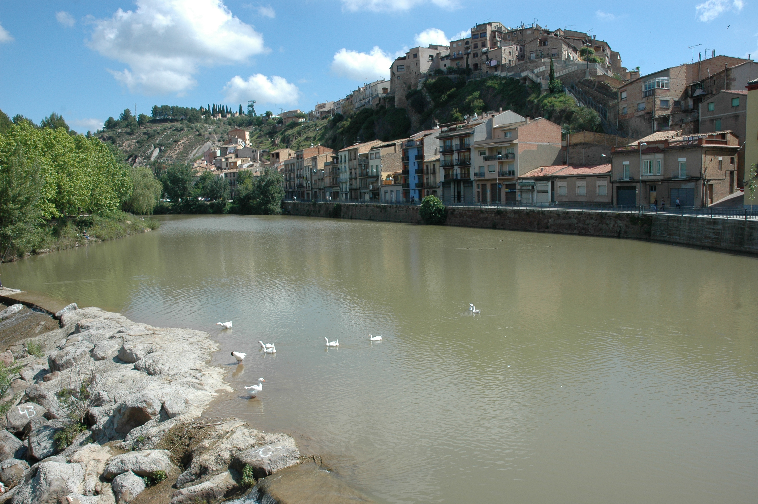 Súria a la vora del Cardener